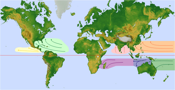 Tc basins